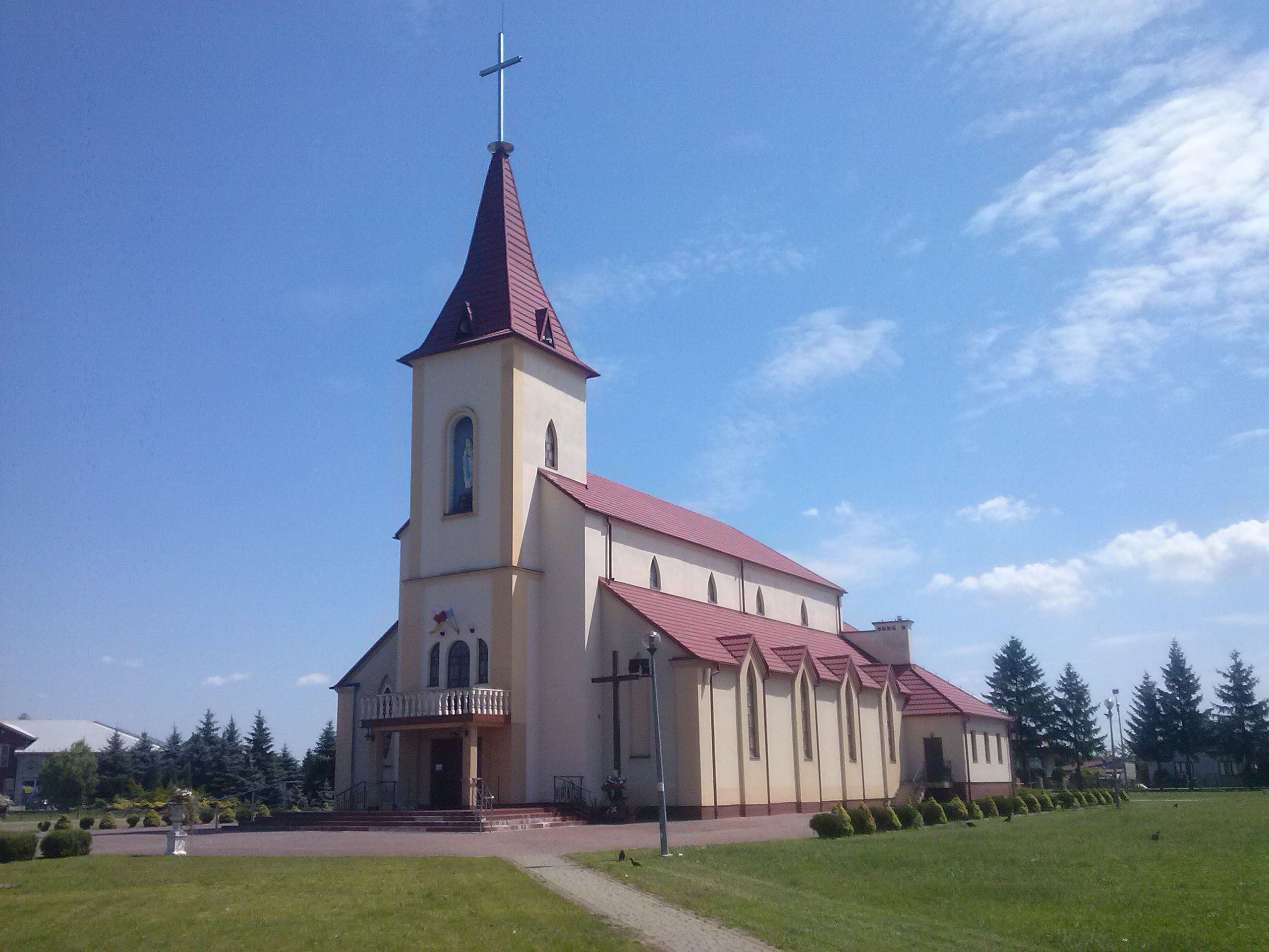 Kościół pw. św. Brata Alberta, przy ul. Zamojskiej